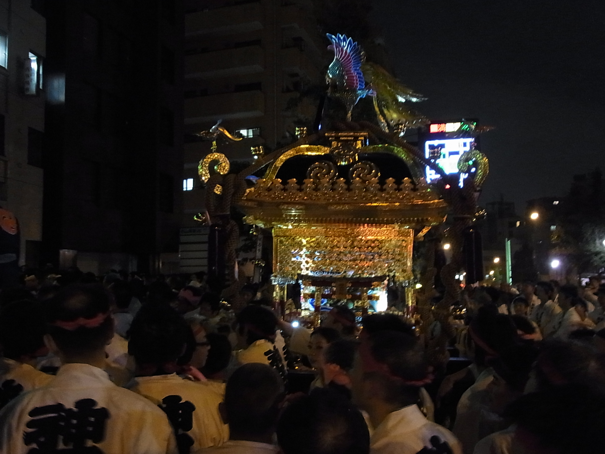 神田祭宮入（2011.10.30）